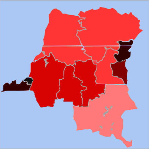 Die Grafik zeigt die Bevölkerungsdichte in den Provinzen der Demokratischen Republik Kongo im Jahr 2010 basierend auf den Daten folgender Internetadresse